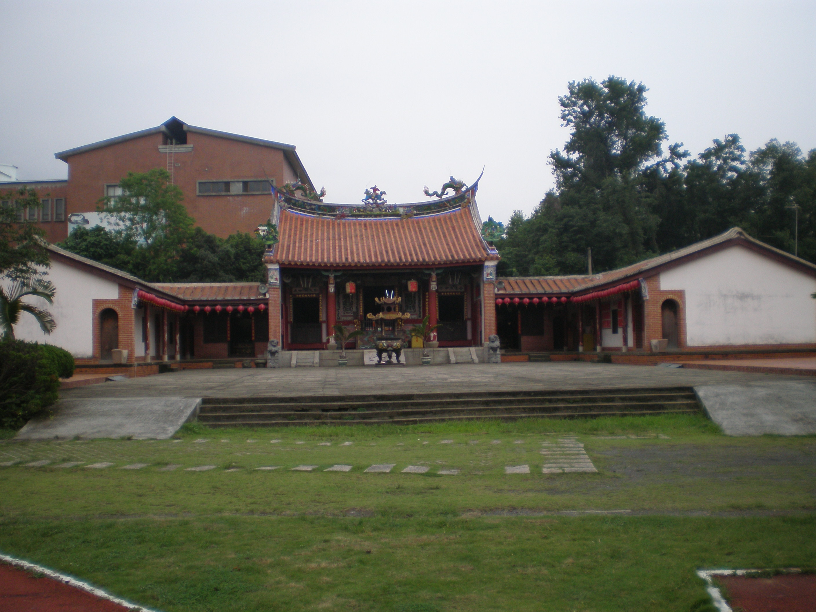 中文（台灣）: 台灣南投縣集集鎮明新書院。